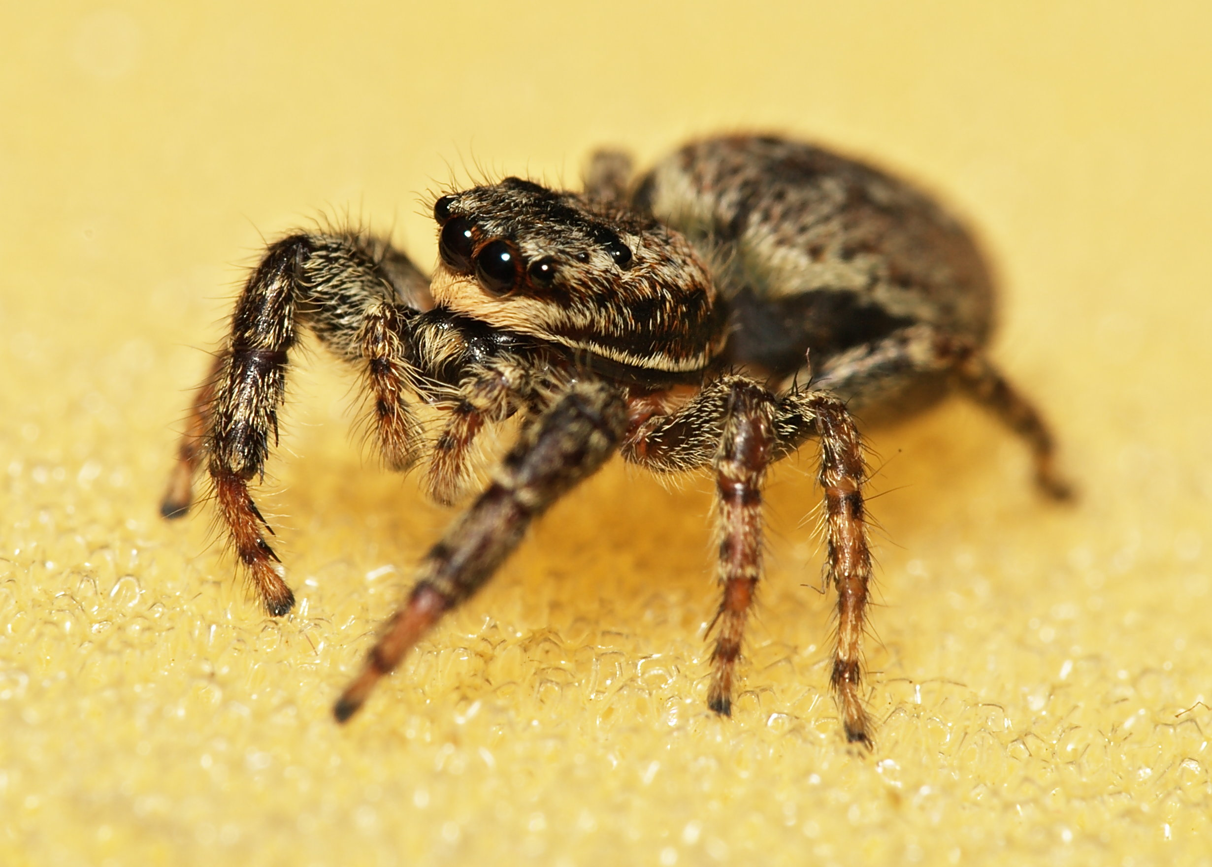 female Marpissa muscosa from Ratingen, Germany.